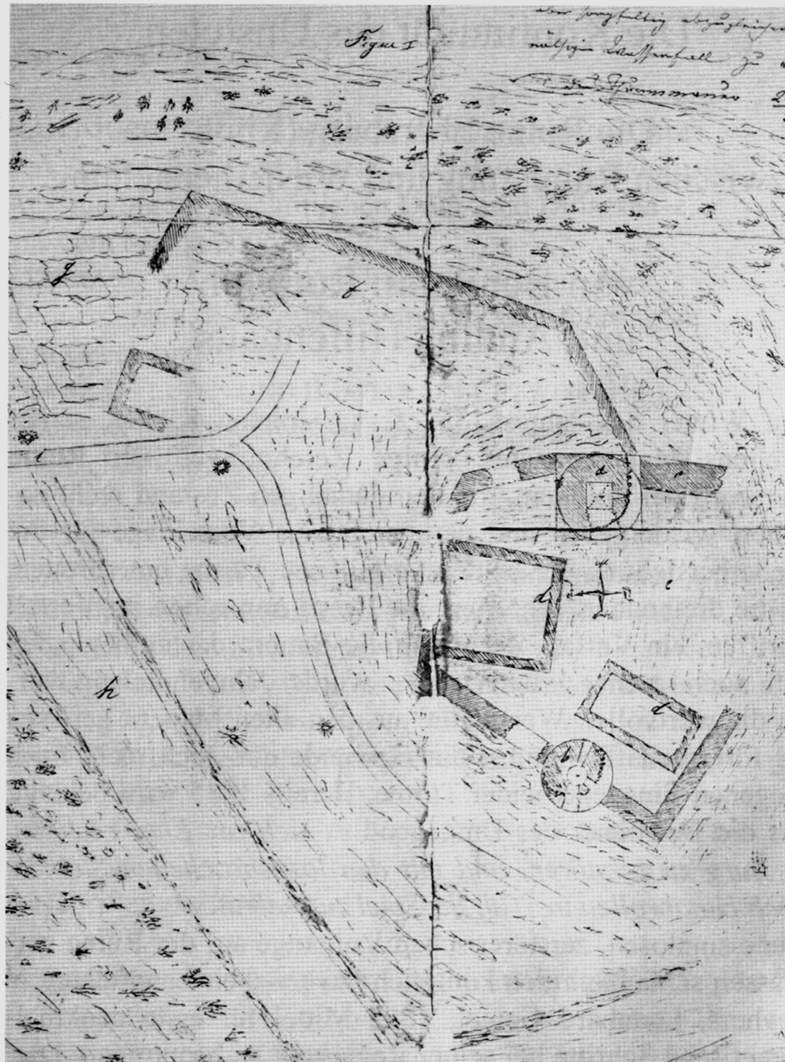 Entwurf der Ruinen der Ebersburg von Maurermeister Johann Klüber